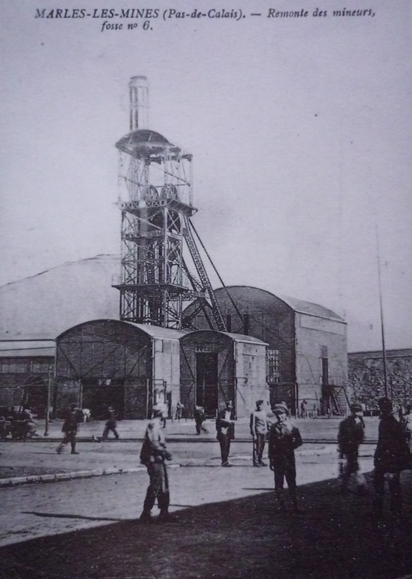 La Fosse n° 6 de la Compagnie des mines de Marles était un charbonnage constitué d'un seul puits situé à Calonne-Ricouart, Pas-de-Calais, Nord-Pas-de-Calais, France.